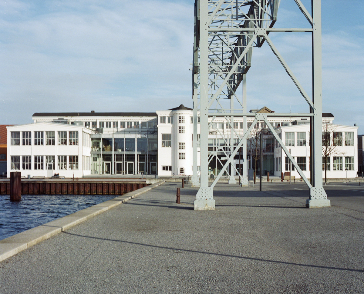 Danish Design School at Holmen in Copenhagen, Denmark